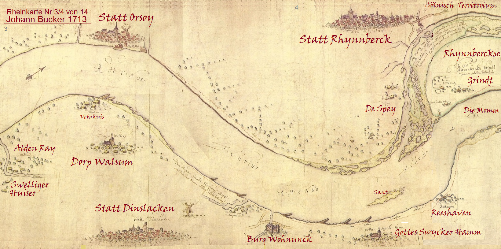 Rheinkarte von Johann Bucker, Rhein bei Dinslaken und Rheinberg, anno 1713